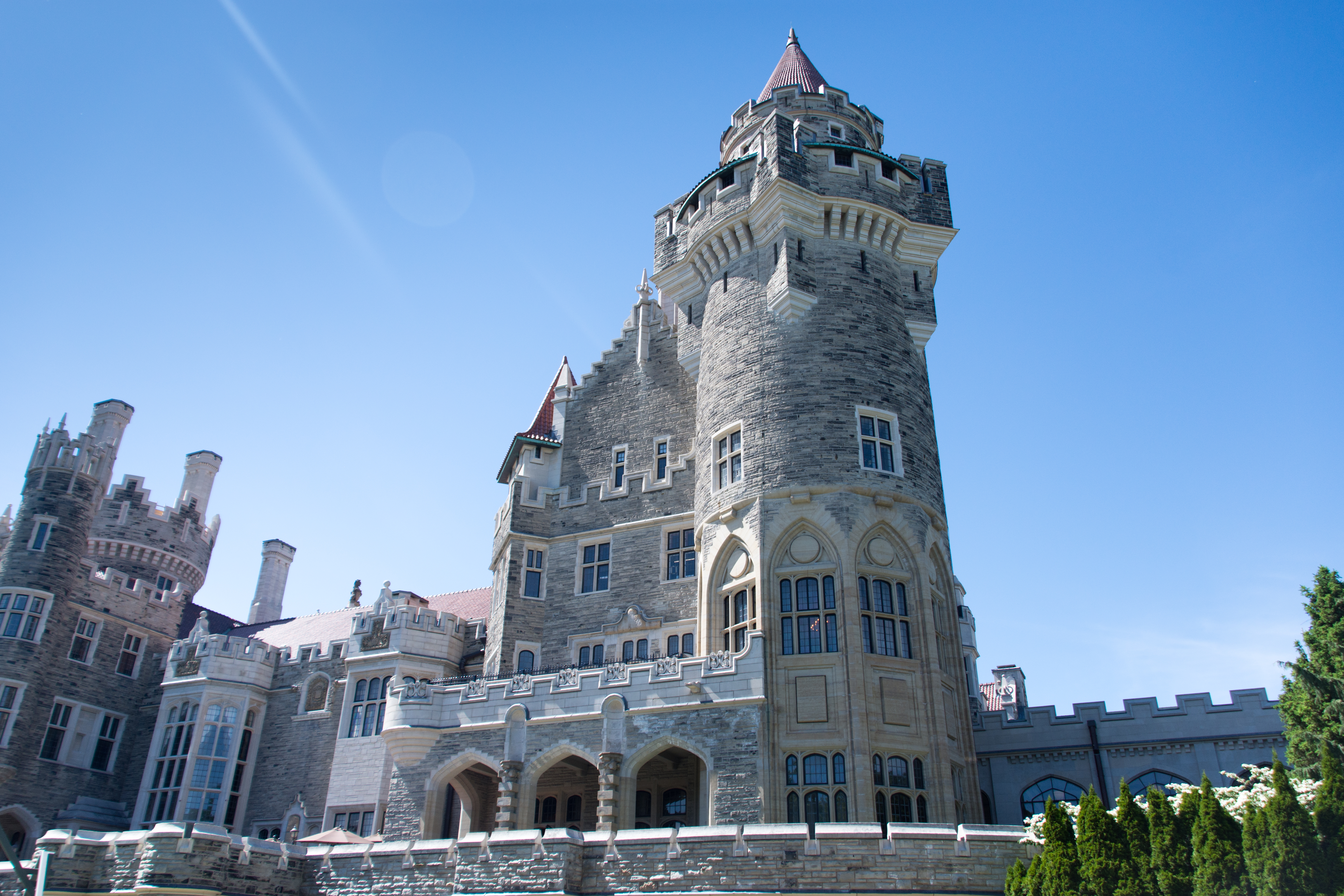 Casa Loma 2016 (65 of 122)